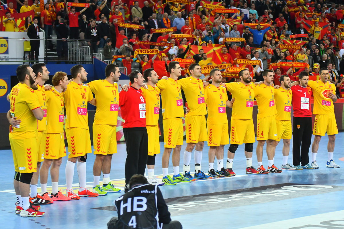 EHF EURO 2018 Crna Gora - Makedonija 15.01.2018